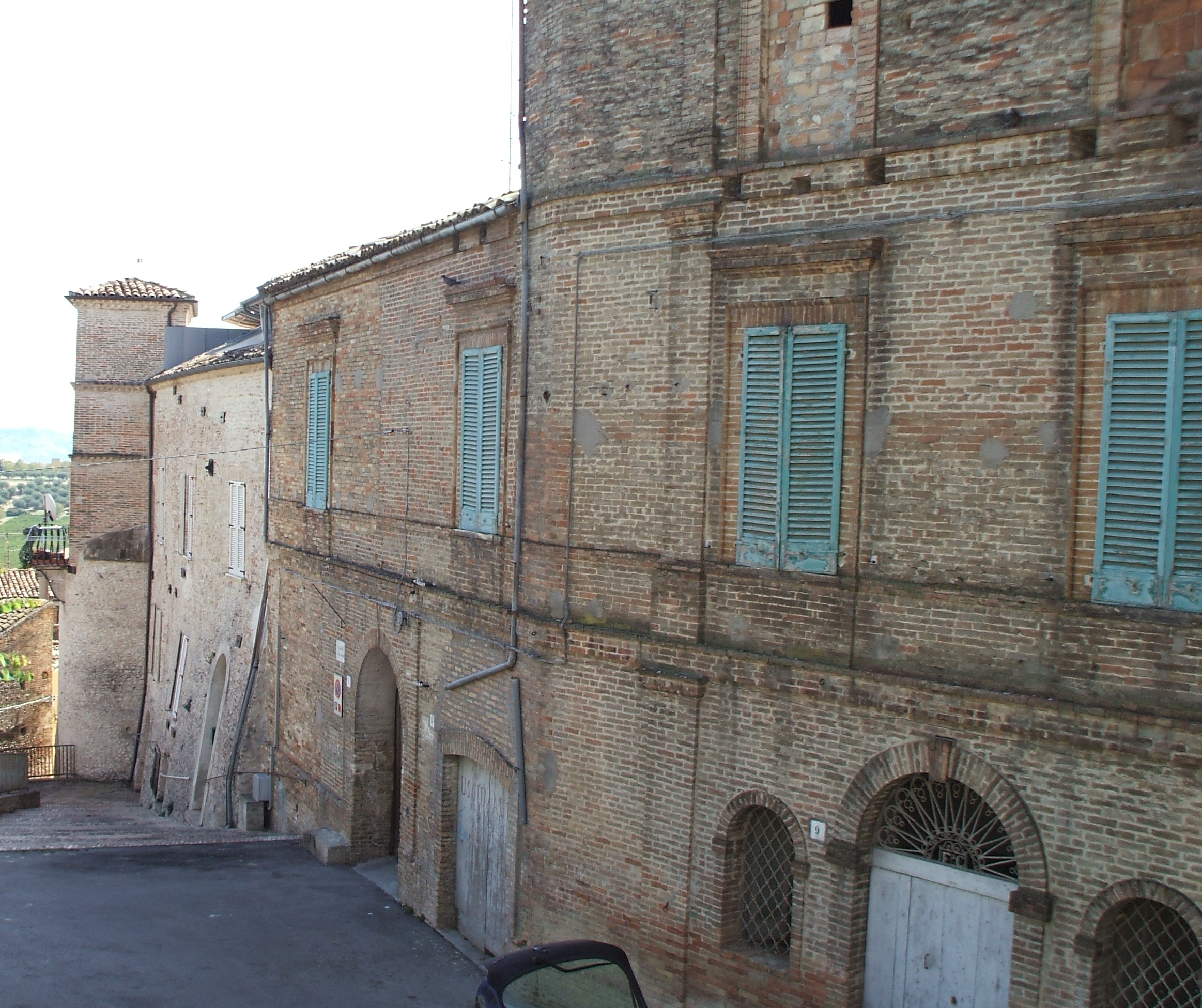 Palazzo d'Avalos, Scerni CH, Italy